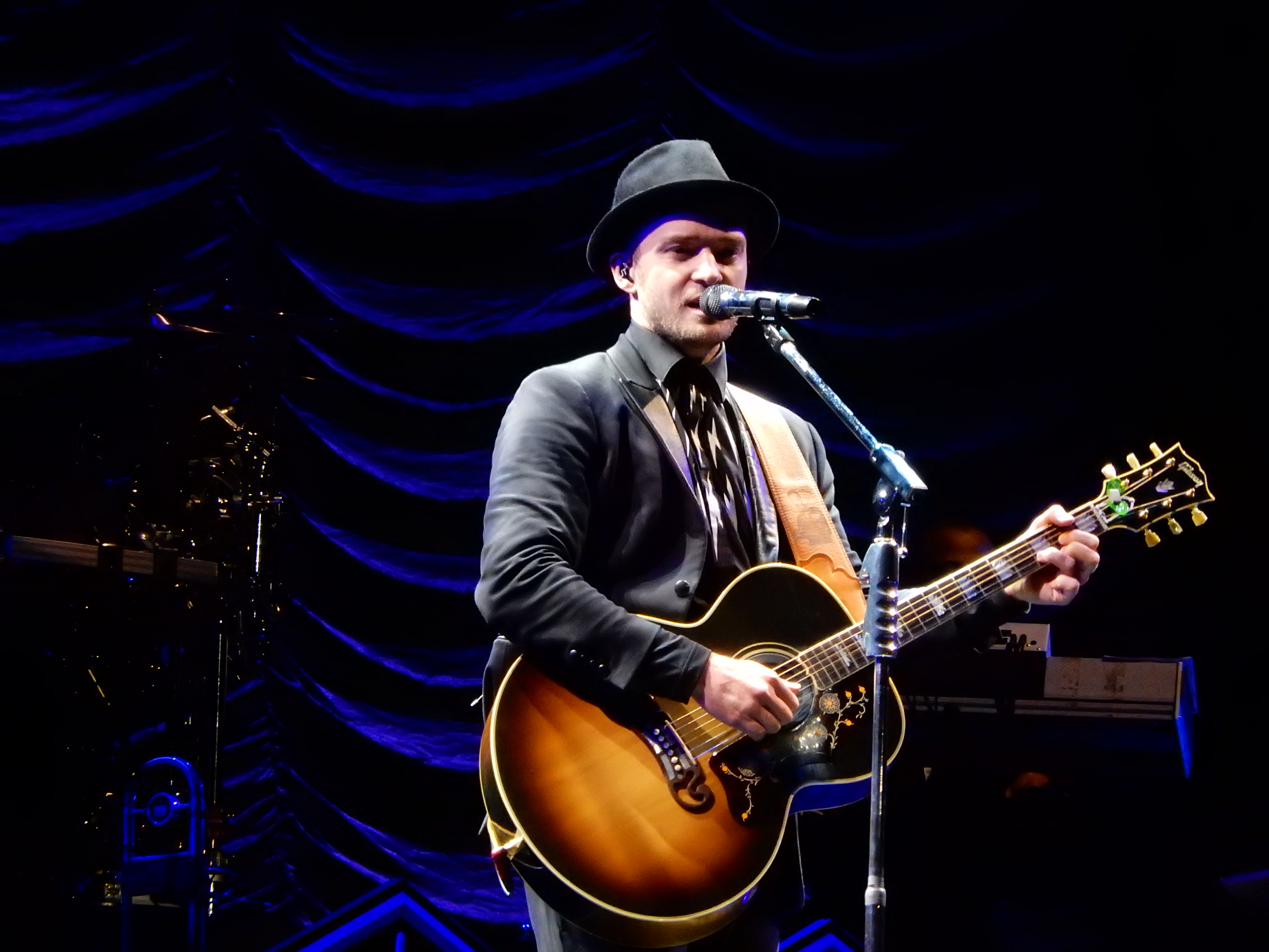 El cantante Justin Timberlake durante su presentación en el V Festival como parte de su gira The 20/20 Experience World Tour. Hylands Park, Chelmsford, Reino Unido.